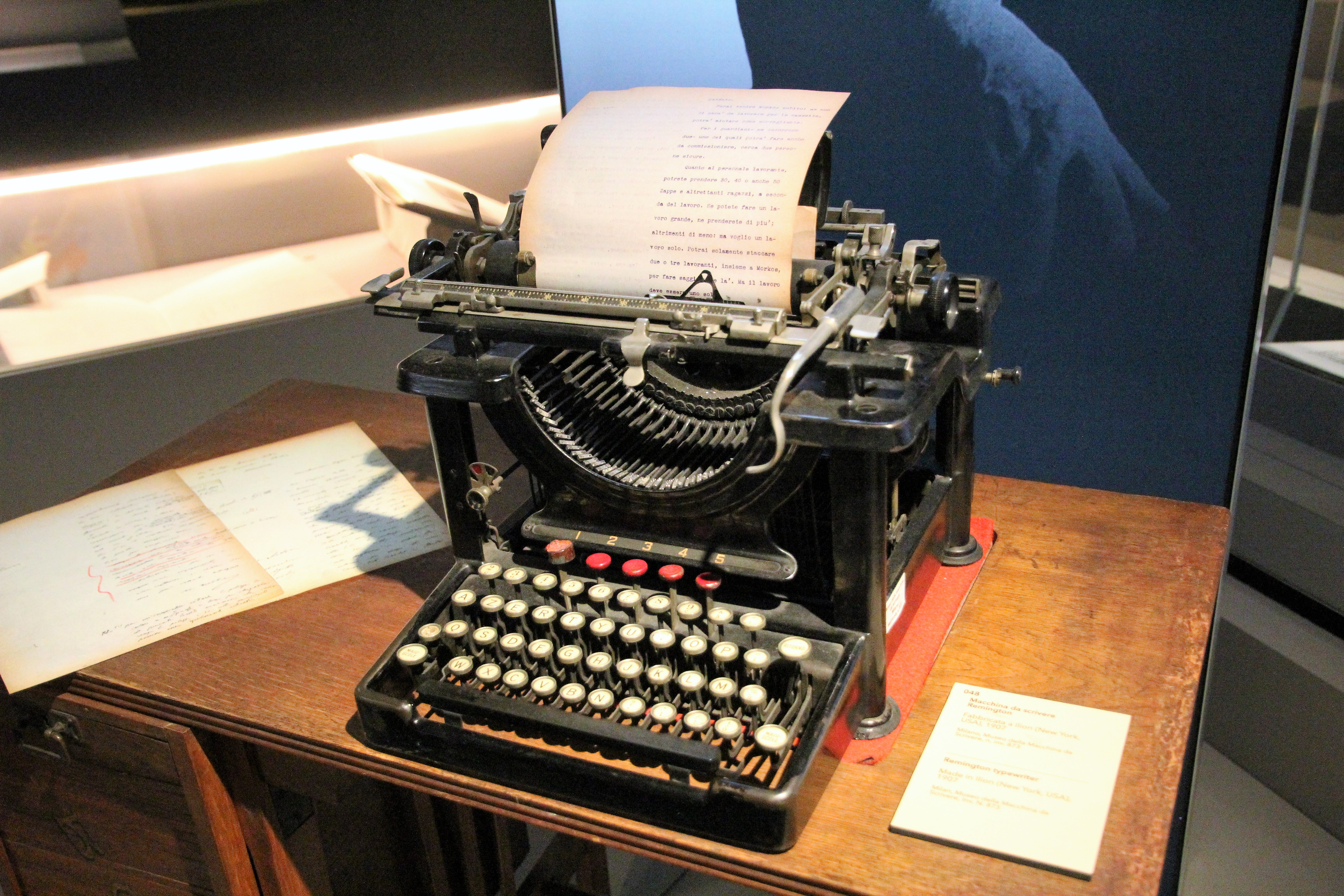 Remington typewriter 1907, presso il museo Egizio